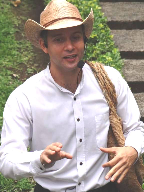 El actor y productor Roberto Zeledón durante una presentación del recorrido teatral en el Centro Nacional de Cultura (CENAC) en el año 2014.